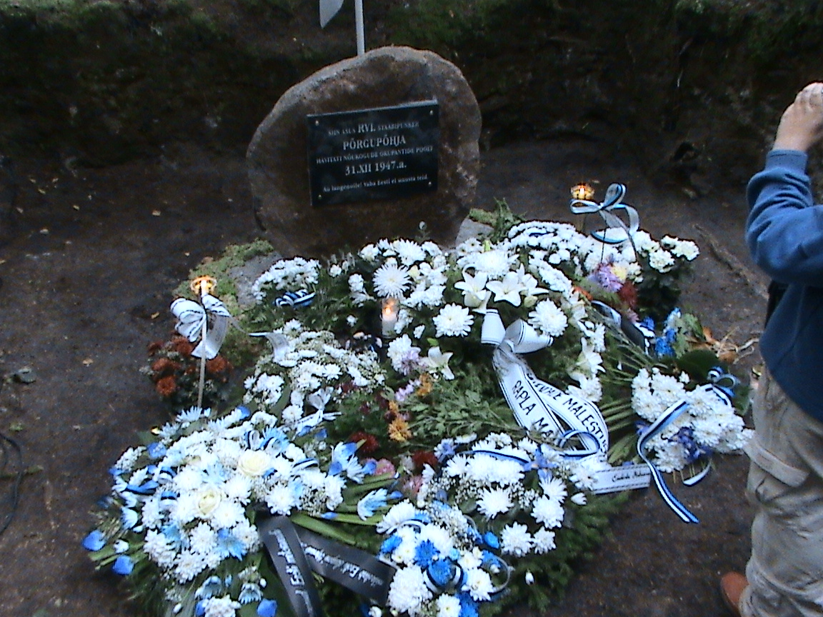 Ausamba avamine 8. septembril 2007